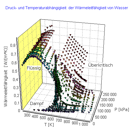 Druck- und Temperaturabhängigkeit der Wärmeleitfähigkeit von Wasser